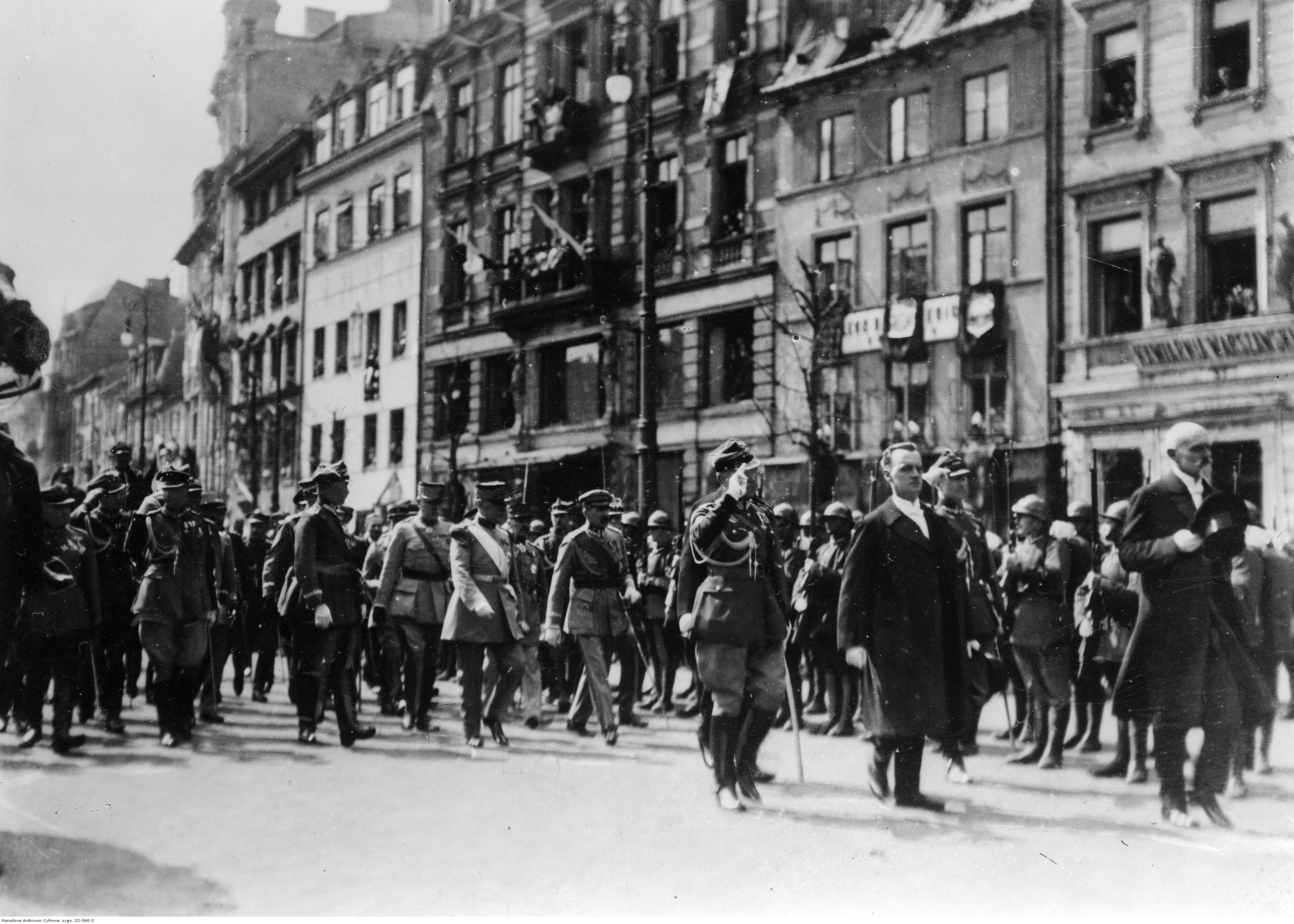 Przybycie gości na uroczystość odsłonięcia pomnika księcia Józefa Poniatowskiego. Pierwszy z prawej idzie prezydent Stanisław Wojciechowski, obok niego premier Władysław Sikorski (z cylindrem w ręku). W II rzędzie idą marszałek Józef Piłsudski (1. z prawej), marszałek Ferdynand Foch udekorowany właśnie Wielką Wstęgą Orderu Virtuti Militari; 2. z prawej), gen. Kazimierz Sosnkowski (4. z prawej). W tle kamienice przy ulicy Krakowskie Przedmieście.